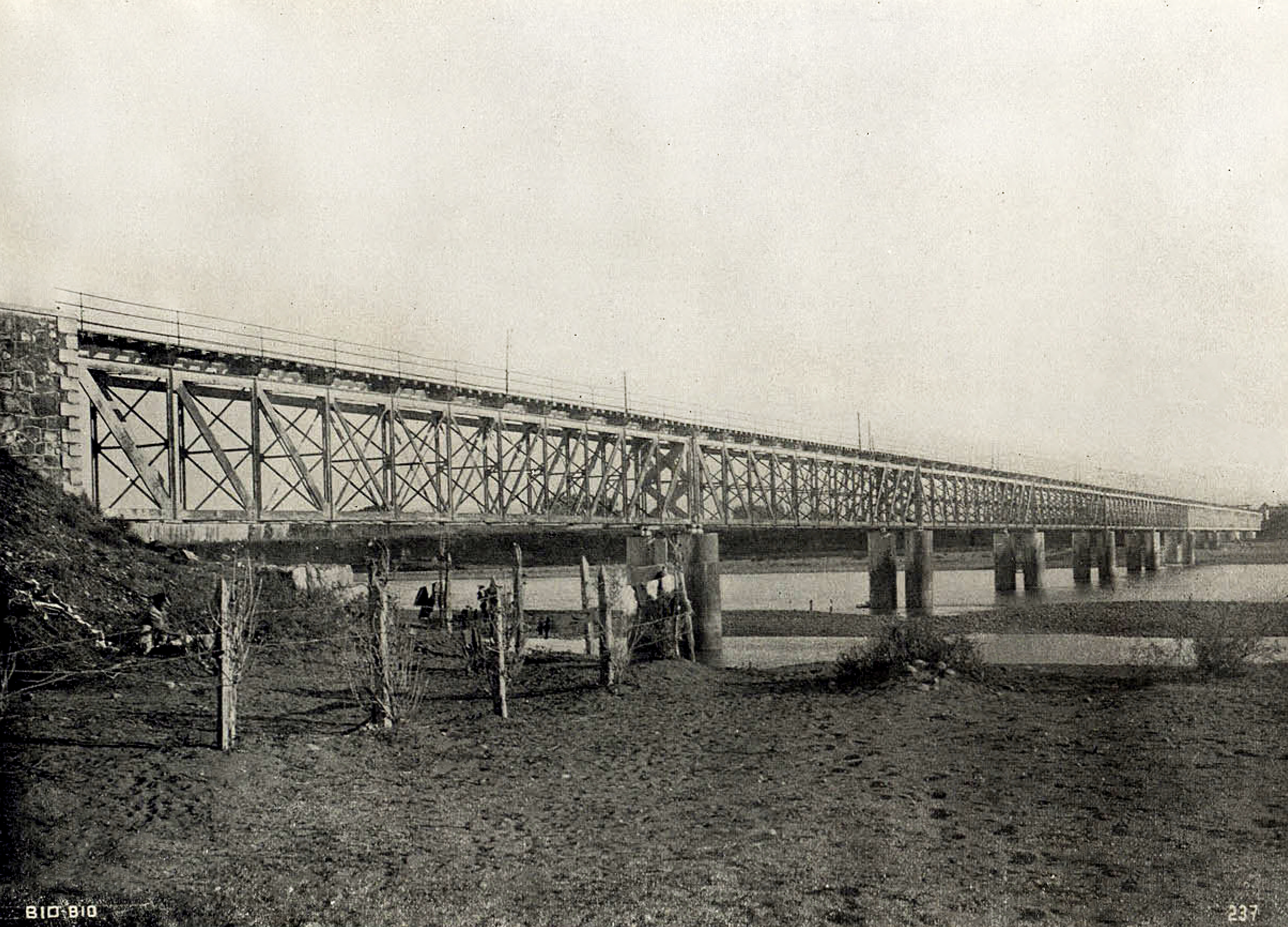 Fotografía ca. 1900 del puente ferroviario sobre el río Biobío en Coigüe, proyectado por Enrique Budge Prats y construido por Lever, Murphy y Cía, en 1890.